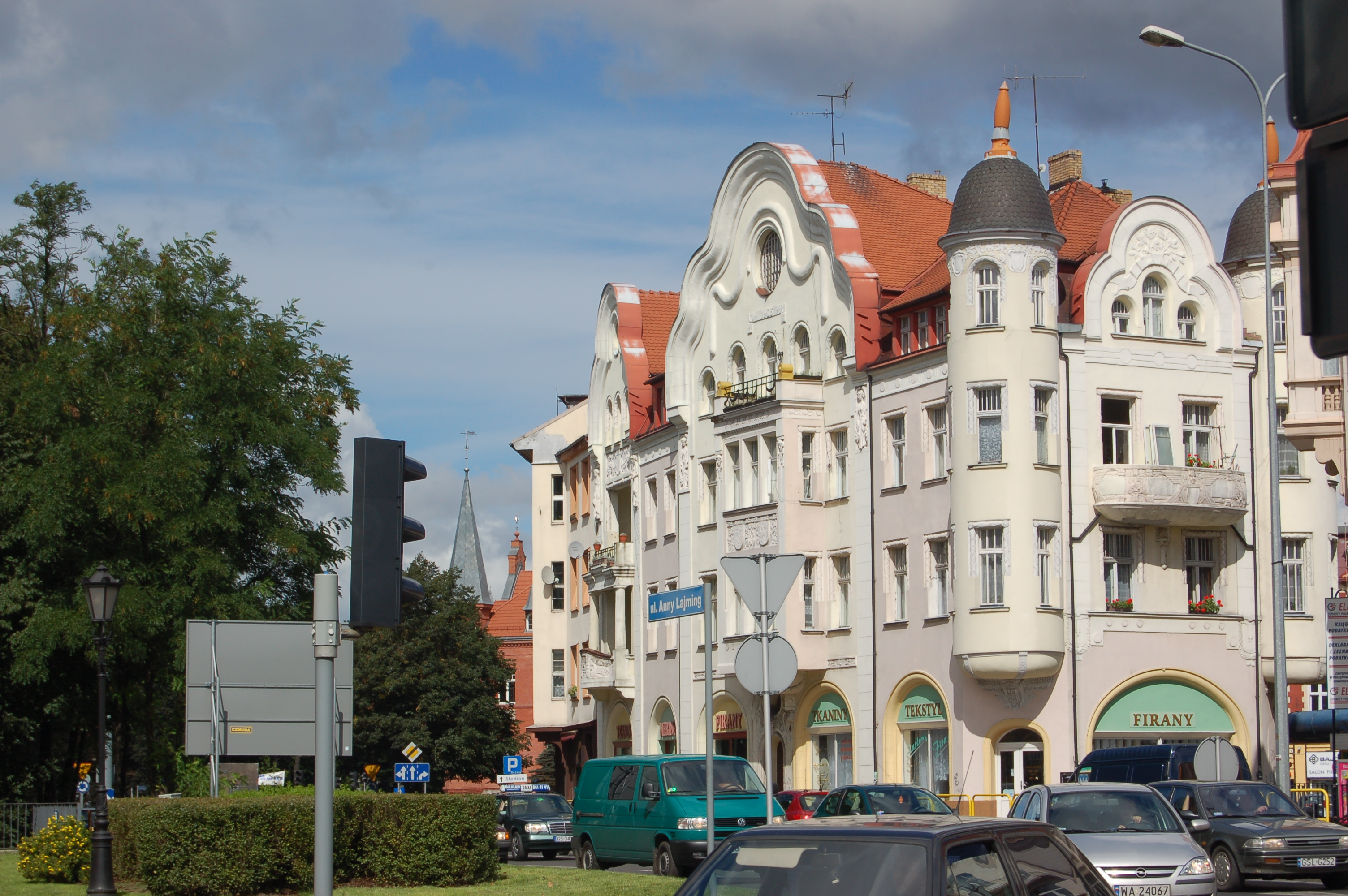 Słupsk, ul. Anny Łajming 4 (dawniej ul. 9 Marca 4) - budynek mieszkalno-usługowy (zabytek nr rejestr. 1219)